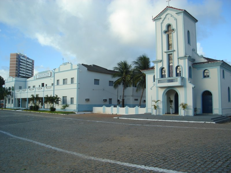 Academia Coronel Minton Freire de Andrade.